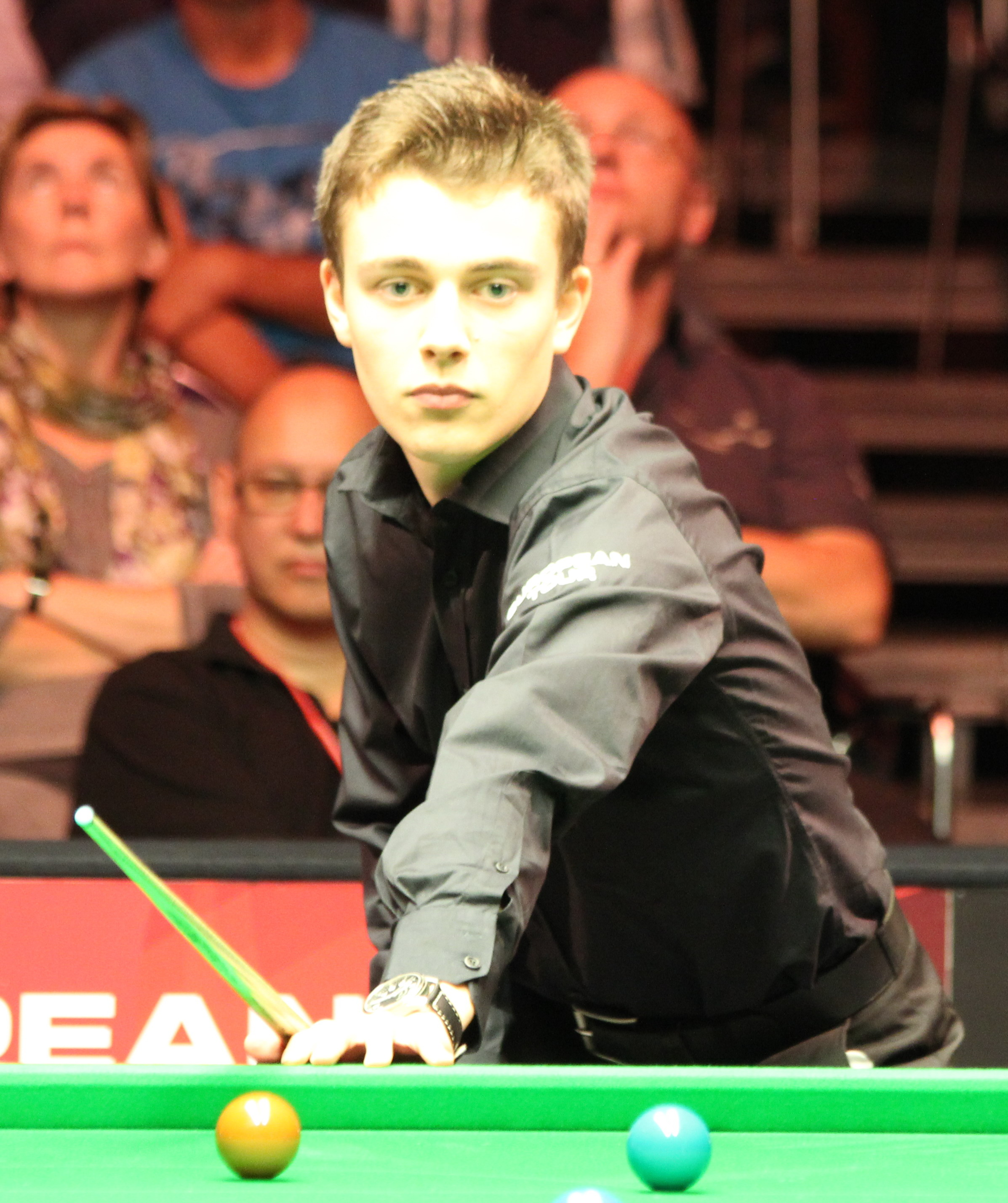 Alexander Ursenbacher beim Paul Hunter Classic 2014